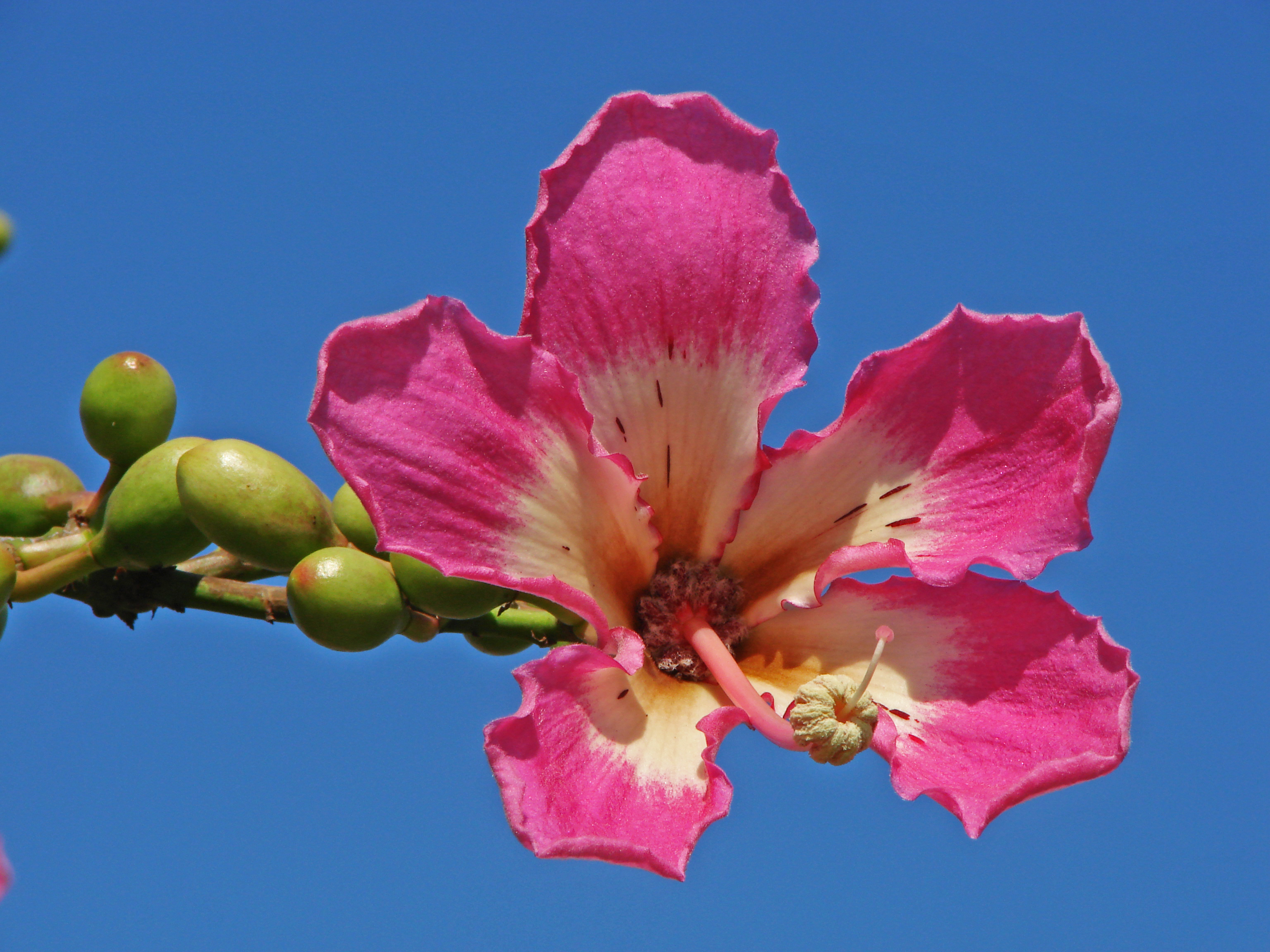 Einzelne Blüte